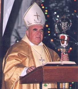 Biskup Andrzej Śliwiński